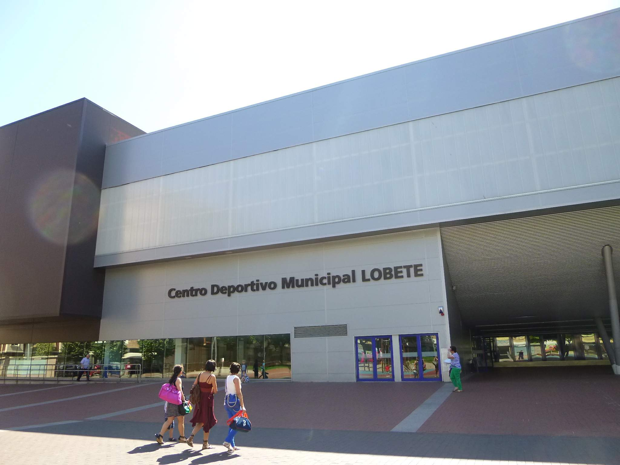 Centro Deportivo Municipal Lobete (Logroño)